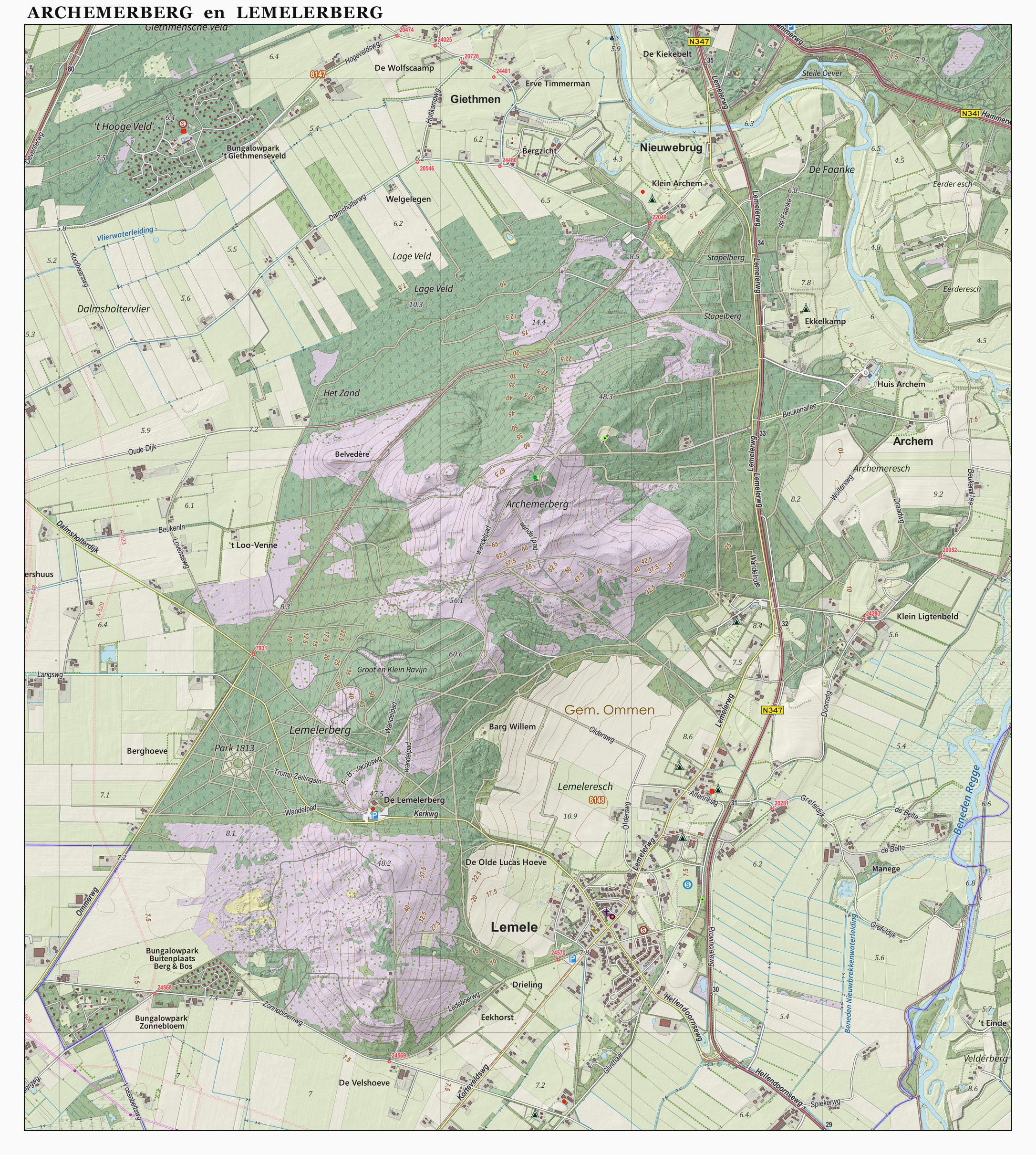 Topografische natuurkaart. Resolutie: 400 pixels/km. Samengesteld door Jan-Willem van Aalst op basis van de GML open geodata van de BRT/Top10NL (basisregistratie Topografie, Kadaster), vrijgegeven door Kadaster onder de Creative Commons BY licentie. Additionele gegevens uit BAG uit de Open Street Map en uit de Risicokaart. Zie ook de Legenda.